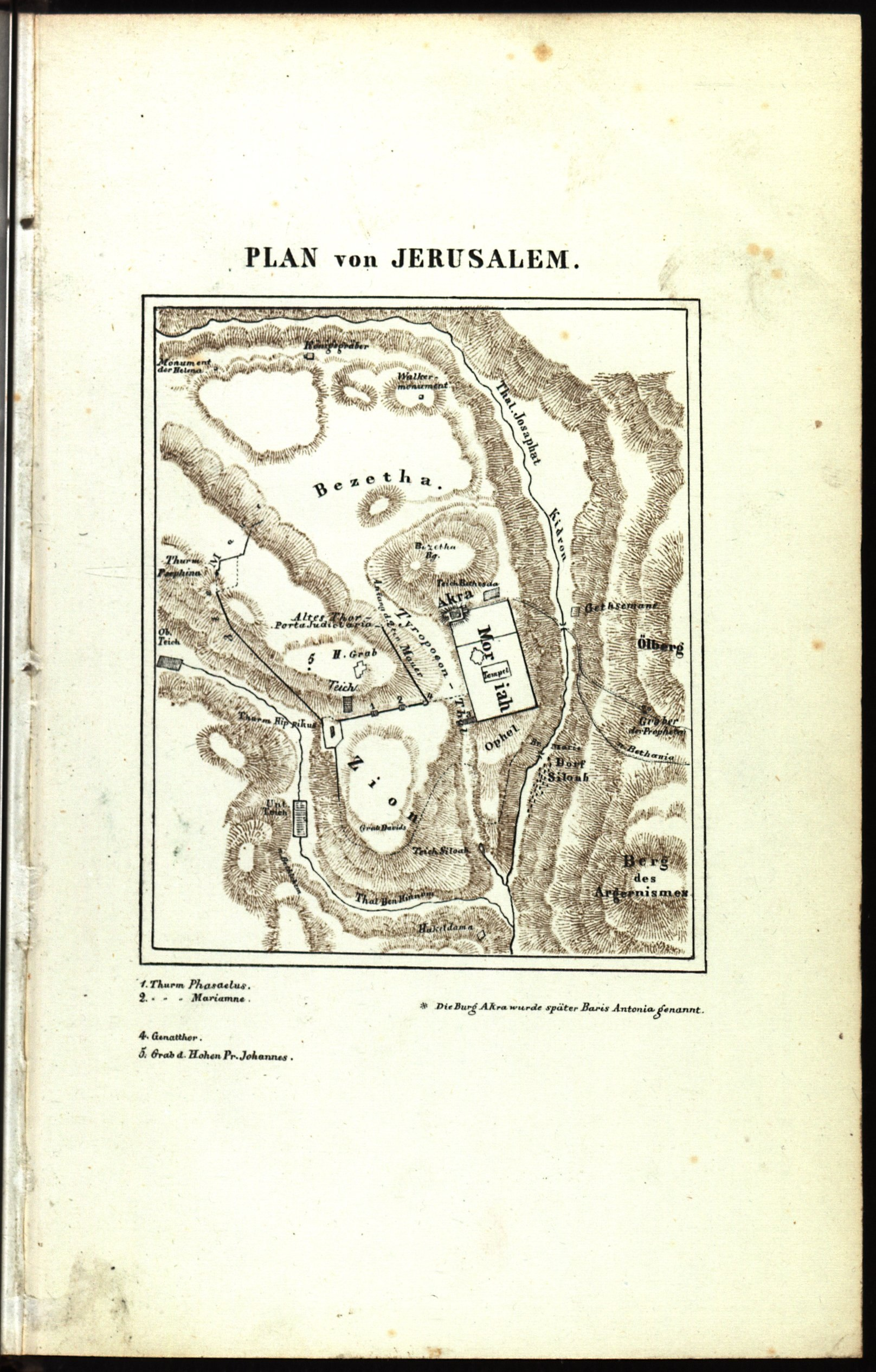 Lithographierter Plan von Jerusalem, 1849. Erschienen in: Die ächte Lage des Heiligen Grabes: Eine historisch-archäologische Untersuchung von Albert Schaffter, Bern 1849.